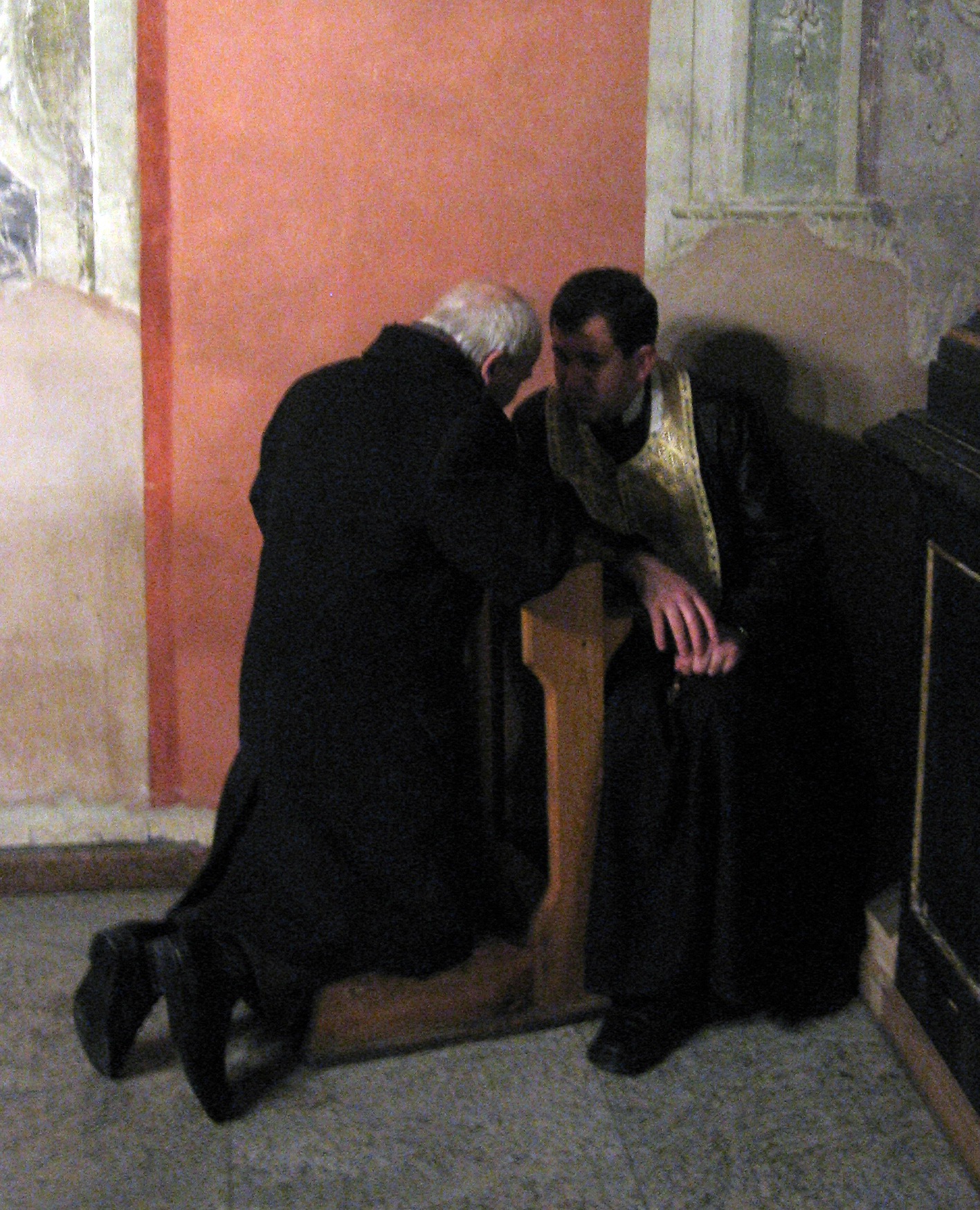 Исповедь. Бернардинский собор во Львове (Церковь Святого Андрея УГКЦ)